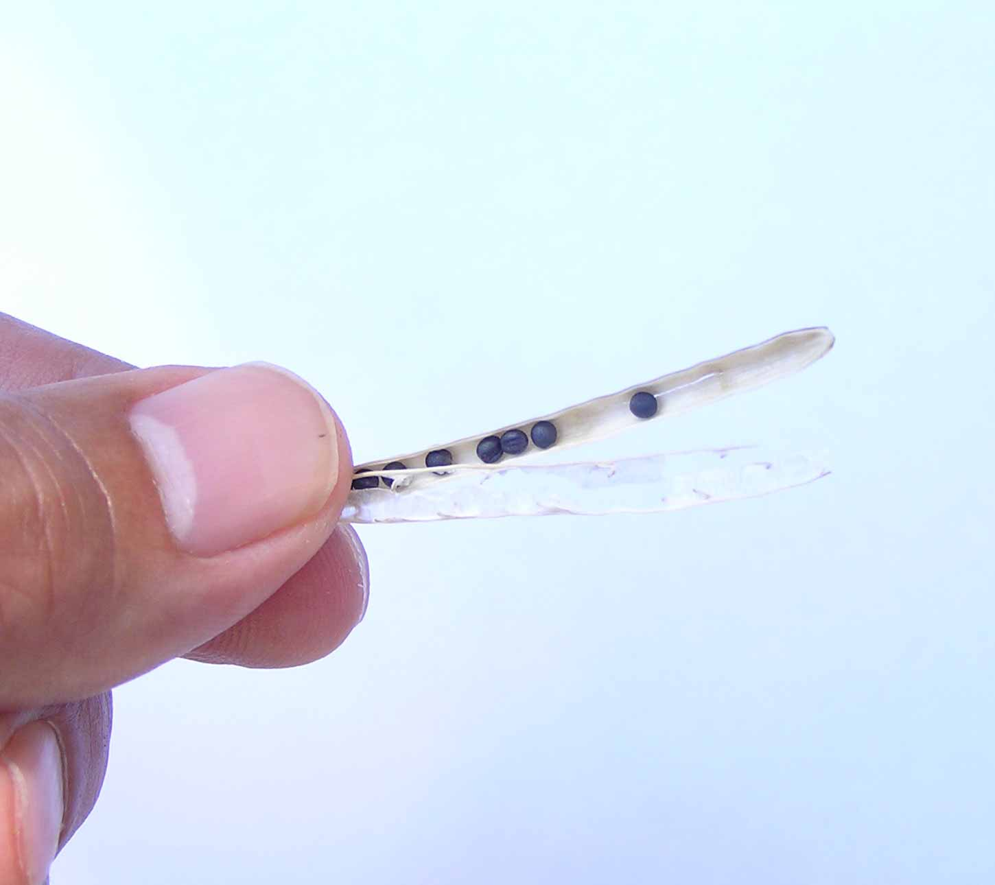 Rapsschote mit Rapskörnern.